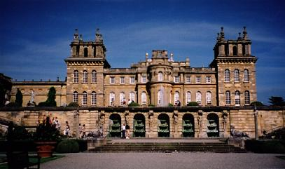 Blenheim Palace, West Facade.